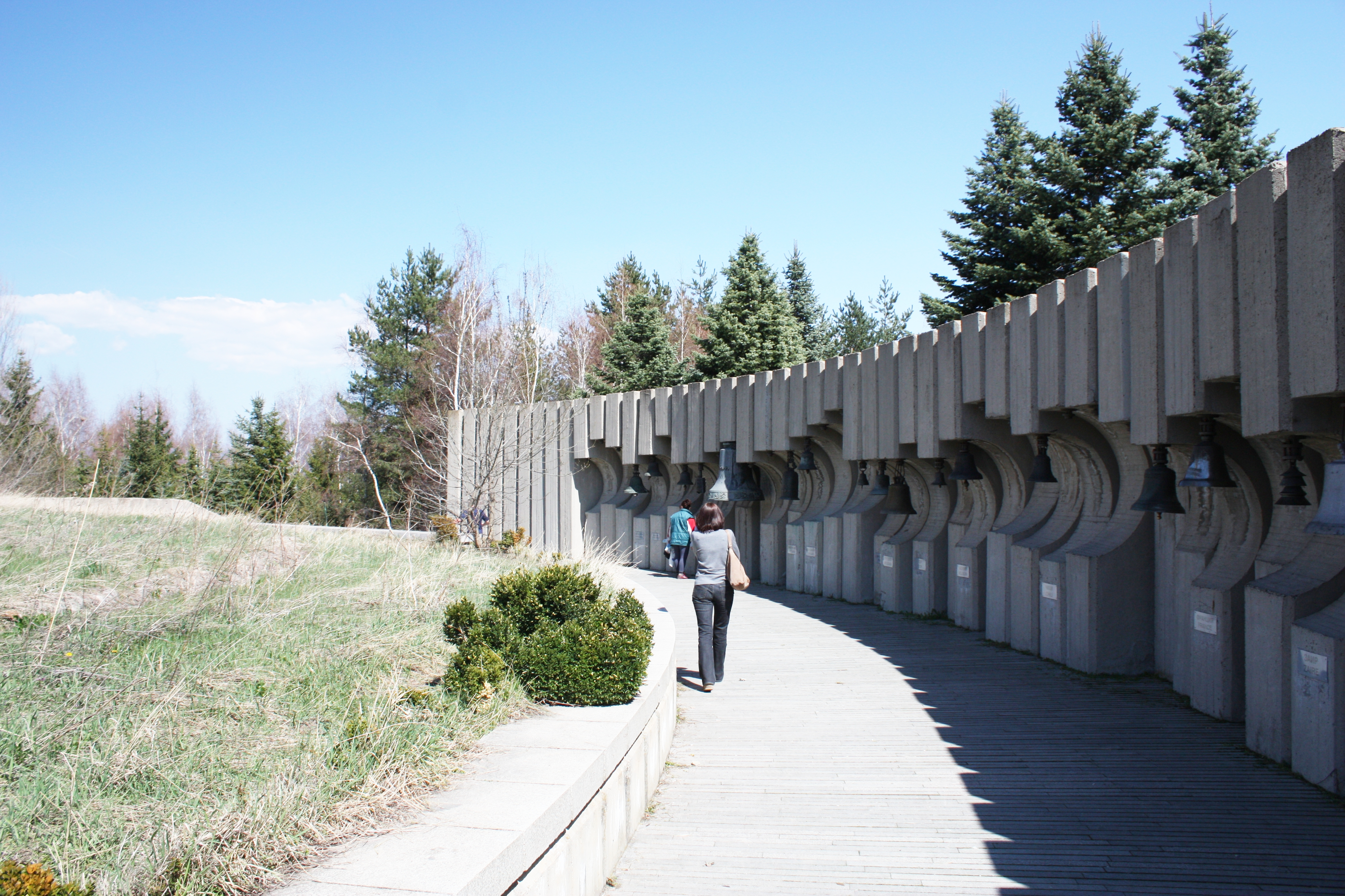 The bells, Die Glocken, Kambanite, Sofia, Bulgaria, Камбаните, София